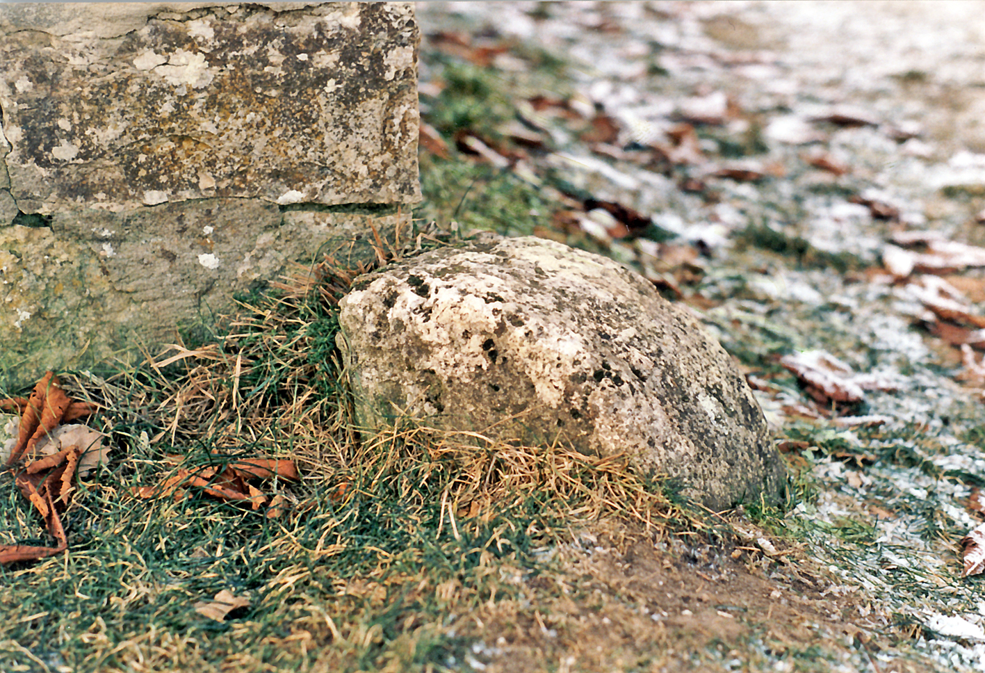 In situ liegender Radabweiser am südlichen Torturm des Kastells Pfünz, Bayern. Zustand im Januar 1993.